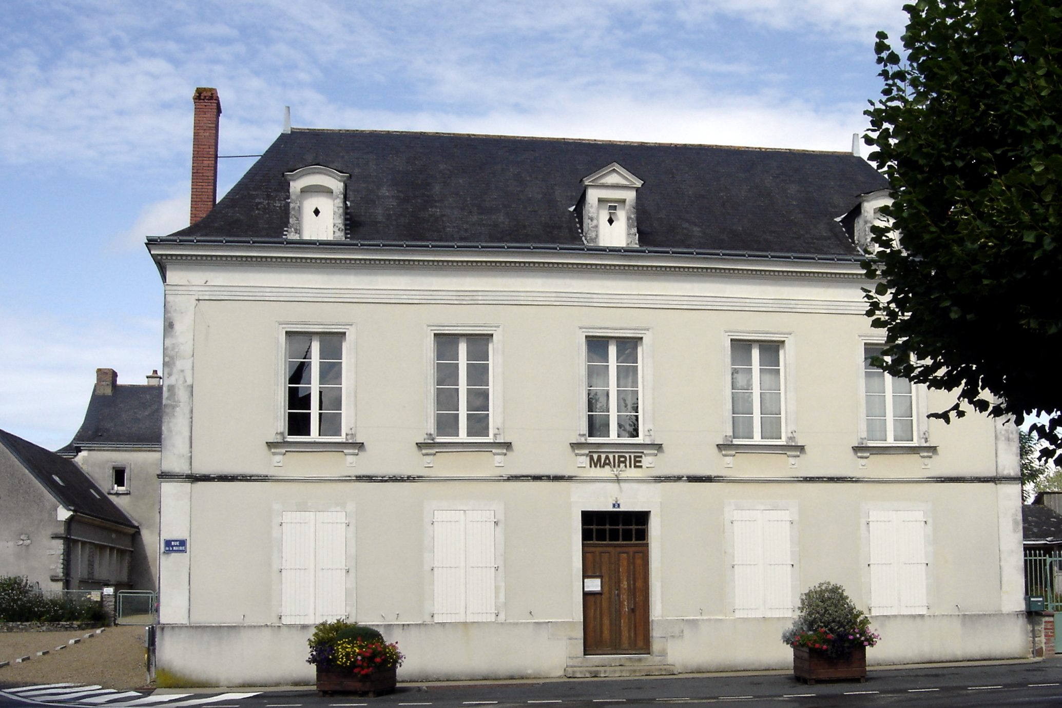 Mairie de Bocé (Maine-et-Loire)